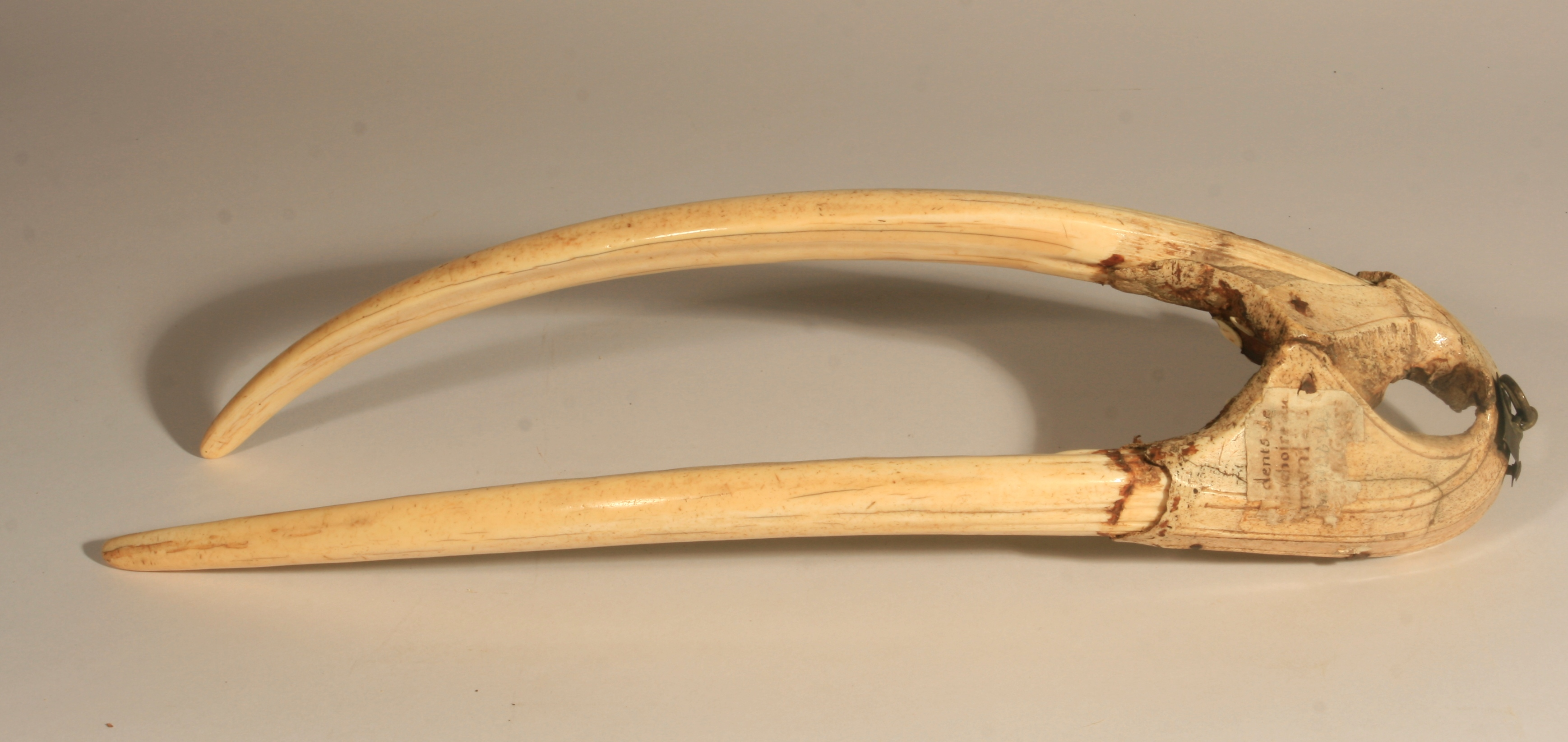 Ivoire de morse conservé au Musée Vert, muséum d'histoire naturelle du Mans. Trophée portant une inscription runique en norois médiéval. Morse chassé dans l'Ouest du Groenland, probablement en baie de Disko aux 13e ou 14e siècles.